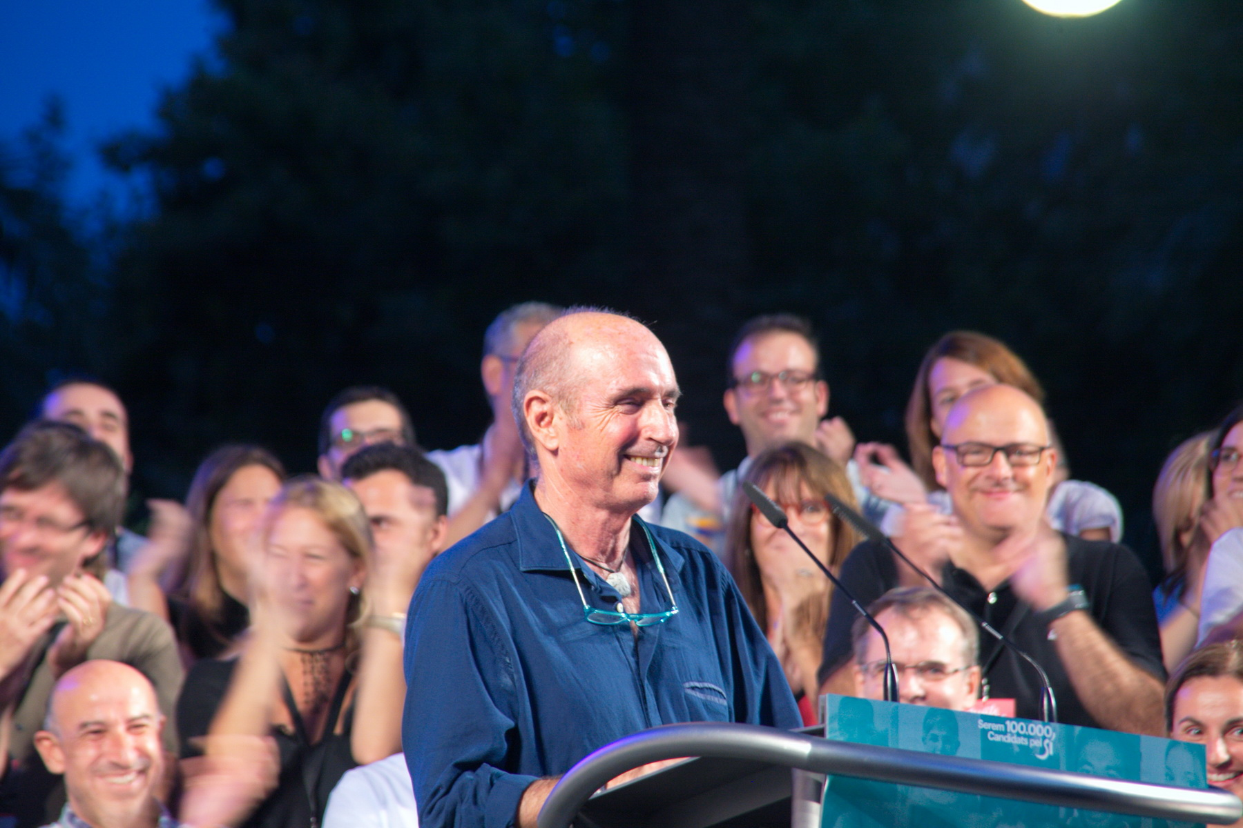 Lluís Llach a l'acte de presentació de tots els candidats de la llista Junts pel Sí a Barcelona, al Psg.Lluís Companys. (28-8-2015)